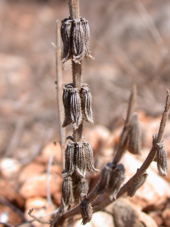 Salvia viridis L. (מרווה דגולה), Mount Carmel, Israel, October 20, 2007.